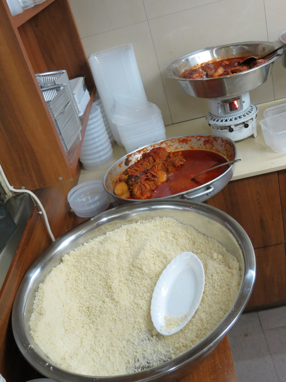 קוסקוס כתוספת קלאסית